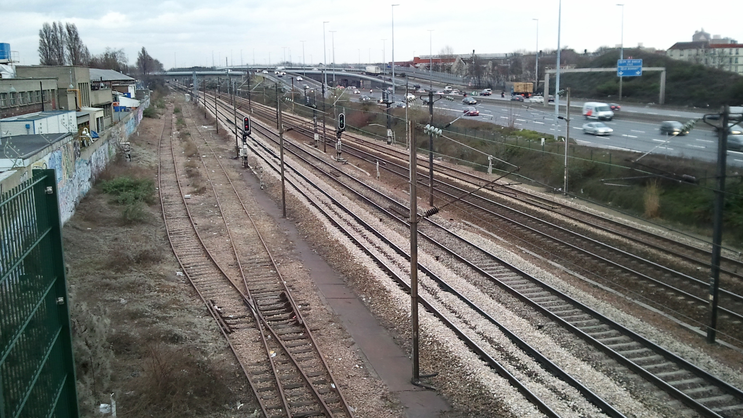 LA Courneuve : Vue, depuis le Pont Palmer, du RER B et de l'Autoroute A86, avec le début du raccordement vers la A1